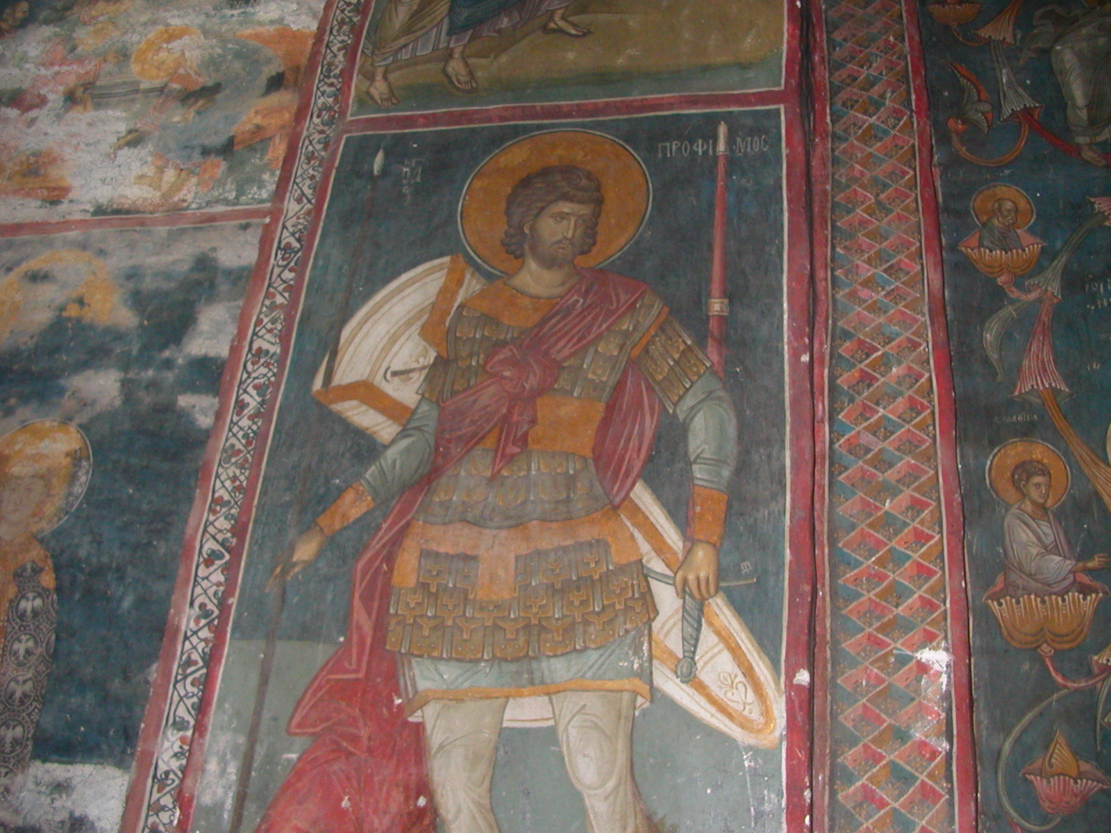 Unutrašnjost manastira Visoki Dečani, autor Nikostrat Saronski